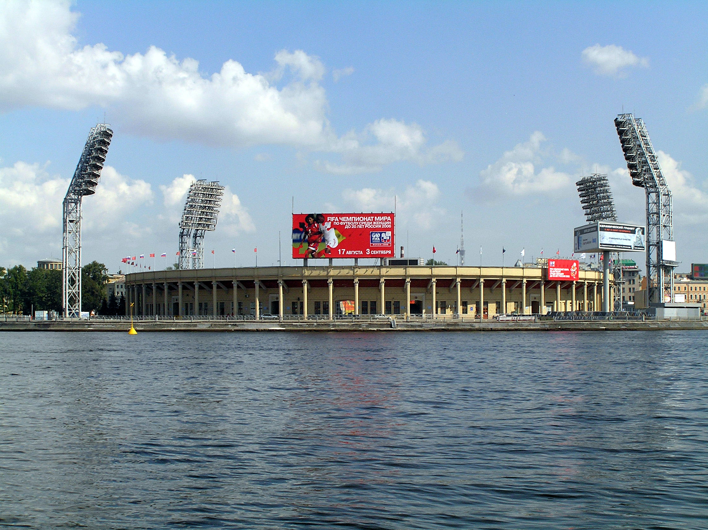 Petrovsky Stadium, Saint Petersburg, Russia